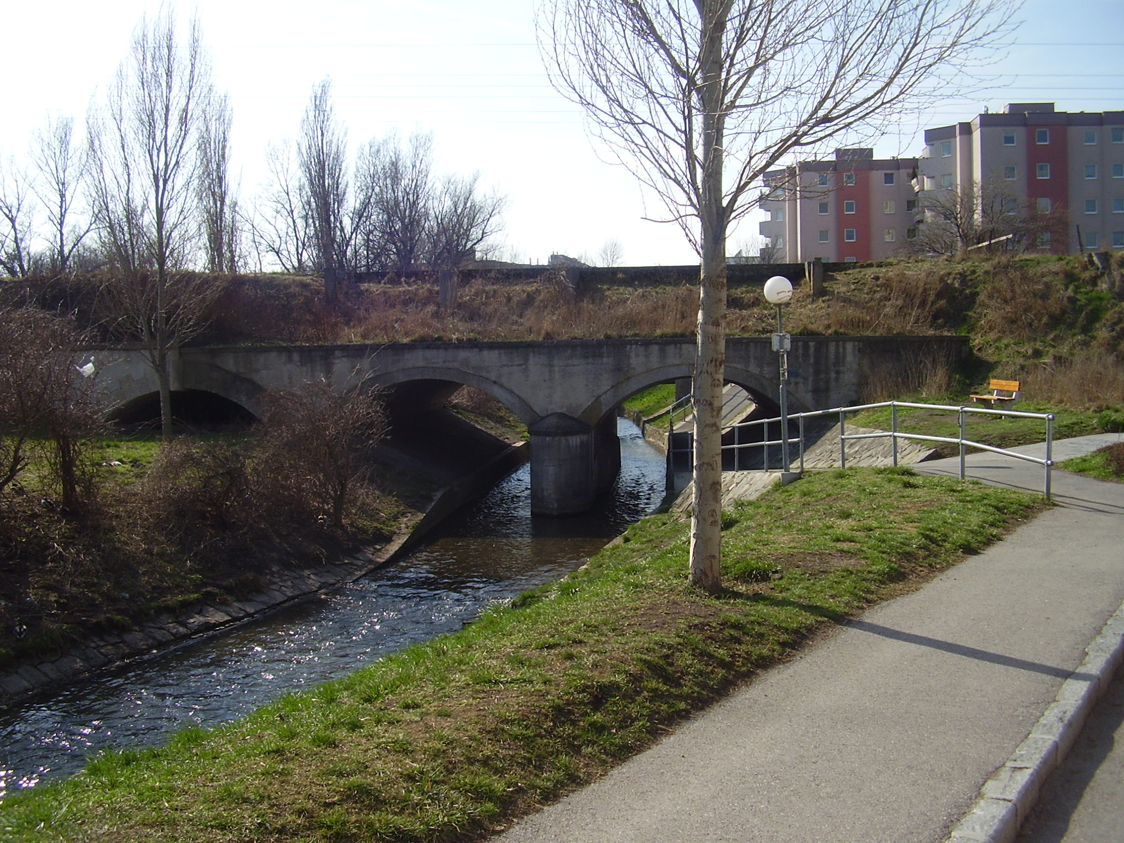 Der Wr. Neustädter Kanal fliesst auf einem Bauwerk (Kanaltrog) über die "Warme Fischa". Wr. Neustadt, Niederösterreich.